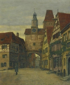 Peter Philippi Rothenburg. Partie in der Altstadt mit Rödergasse und Markusturm